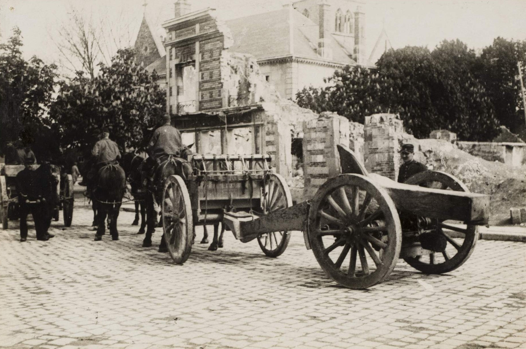 Aux environs de Reims Une batterie de 155 Rimailho se rend sur le front pour prendre position.